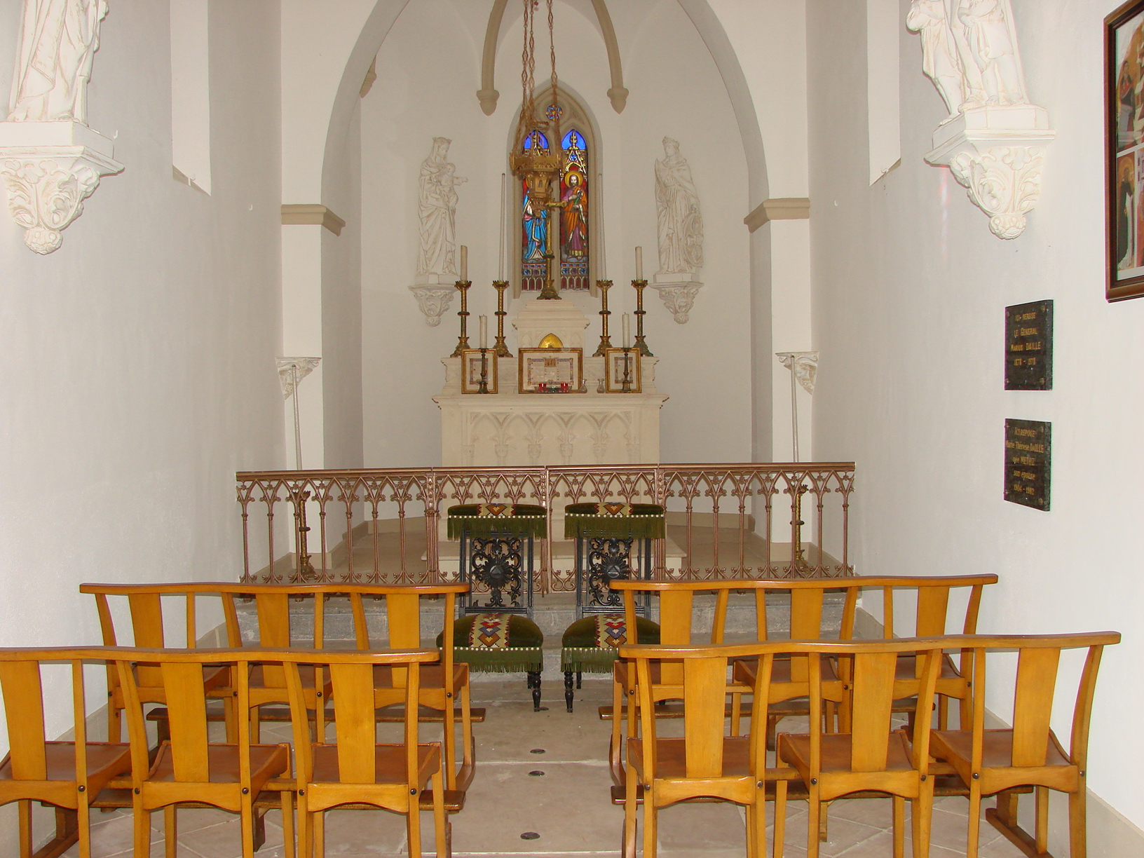 L'intérieur de la chapelle du Plantier à Hyères, Var, 2010.